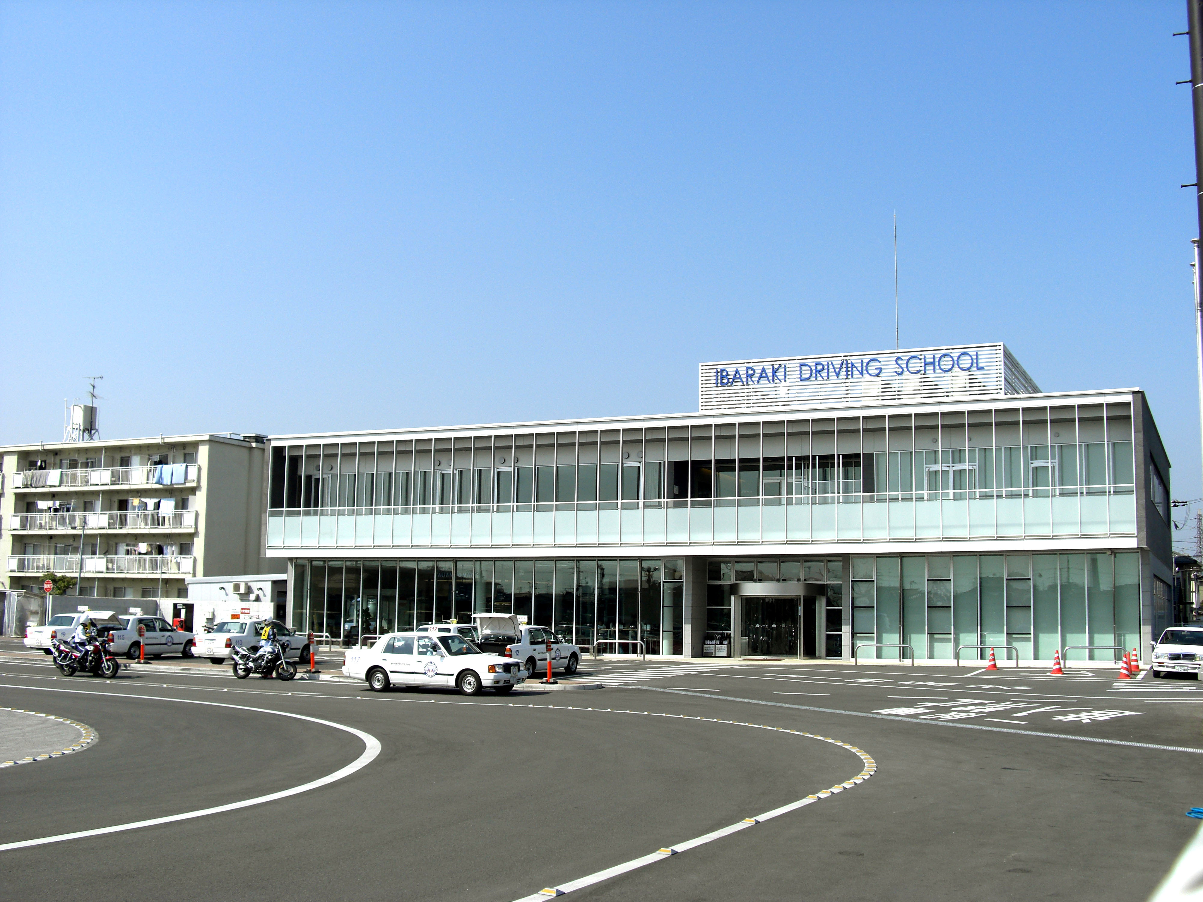 Ibaraki Driving School,Kuwatacho Ibaraki-City Osaka Japan.